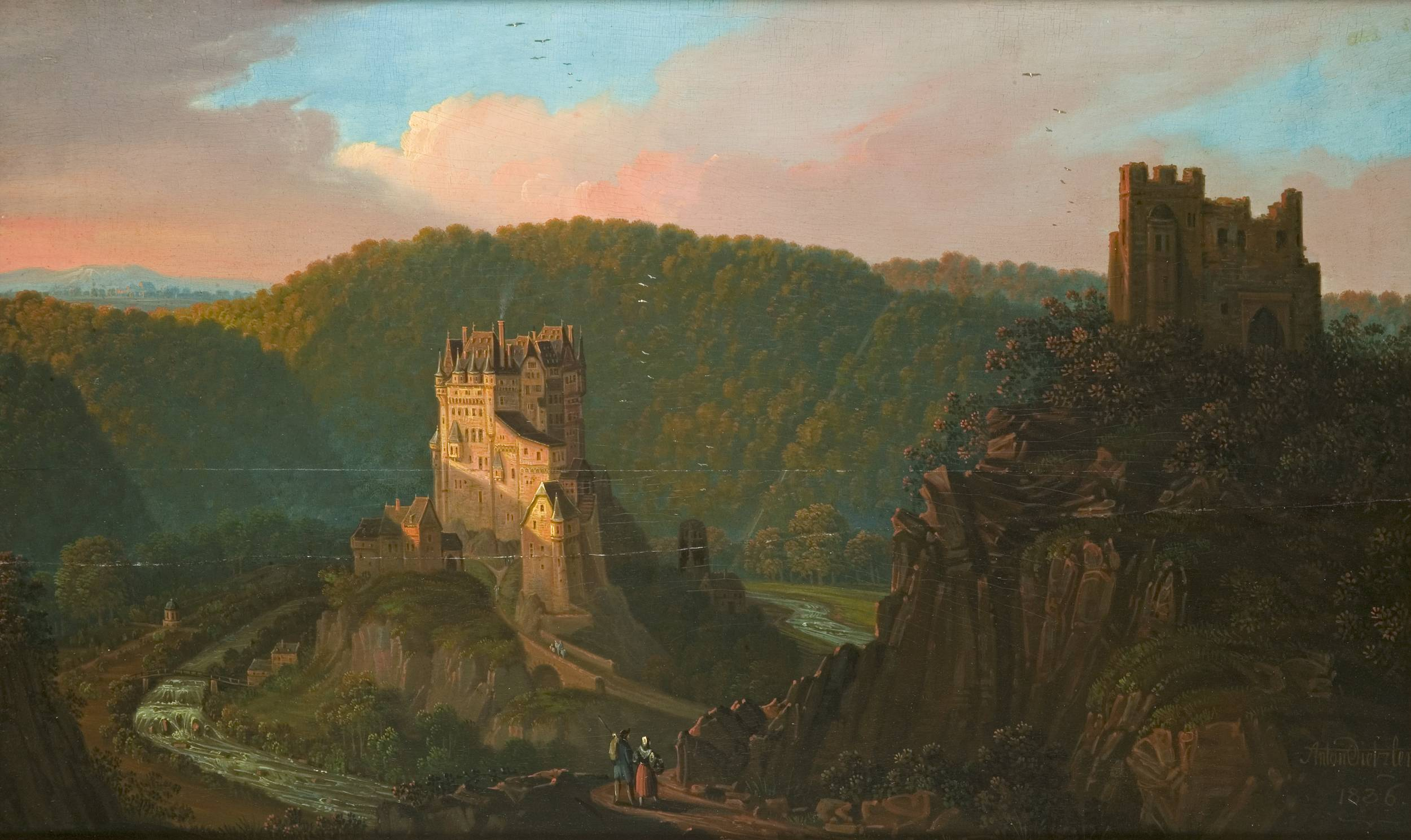 Burg Eltz mit der Ruine Trutz Eltz